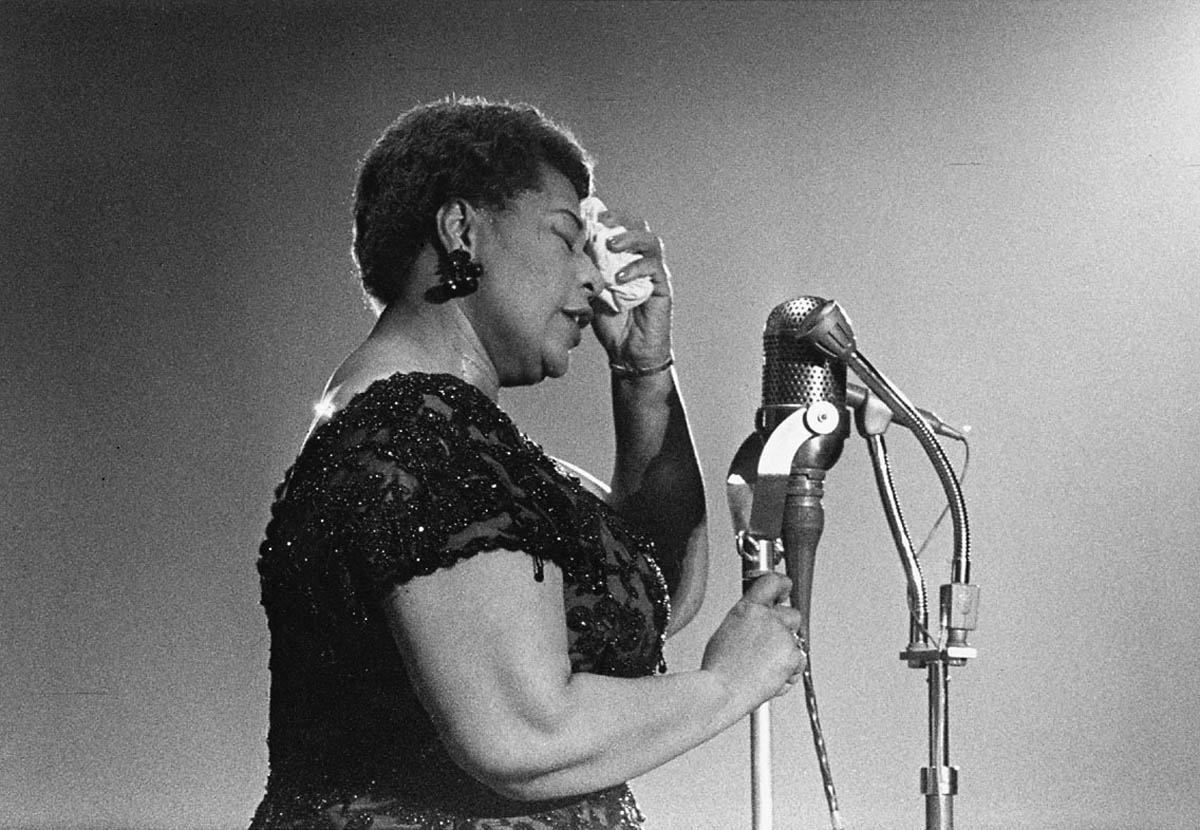 Ella Fitzgerald in het Concertgebouw, Amsterdam, 18 februari 1961 Foto Ben van Meerendonk / AHF, collectie IISG, Amsterdam